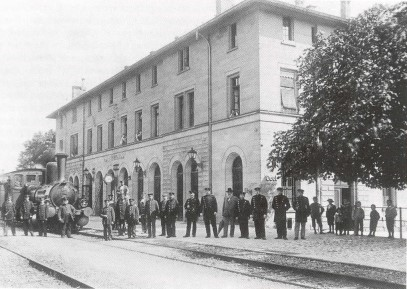 Bf. Öhringen